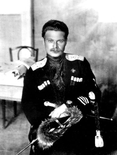 Cossack general Andriy Shkuro